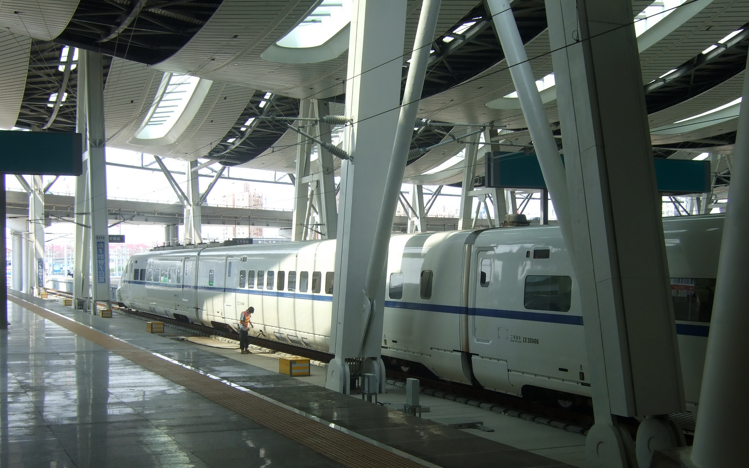 中文（中国大陆）: 北京南站站台，钢结构雨篷与Ａ形塔架支撑体系